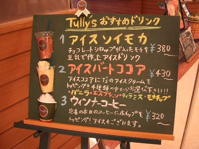 私は、"soy swirkle"にしました。（このお勧めの中にはない。/笑）豆乳をベースにしたオリジナルミックスとエスプレッソを合わせたフローズンドリンクです。cafe / おすすめドリンク